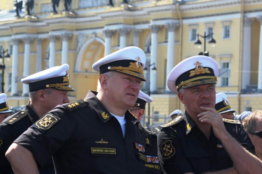 Главнокомандующий ВМФ России адмирал Николай Евменов и заместитель Главнокомандующего ВМФ России адмирал Александр Витко на тренировке прохождения боевых кораблей-участников Главного военно-морского парада в Санкт-Петербурге